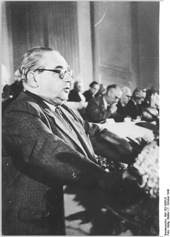 ADN-ZB Heilig 7.10.1949 Berlin: Gründung der Deutschen Demokratischen Republik am 7.10.1949. Im Gebäude der DWK (Deutsche Wirtschaftskommission) in der Leipziger Straße fand am 7.10.1949 die 9. Tagung des Deutschen Volksrates statt, auf der das Manifest der Nationalen Front des demokratischen Deutschland verkündet wurde. Aussprache zum Manifest: Prof. Dr. Hermann Kastner am Rednerpult. 4128-49